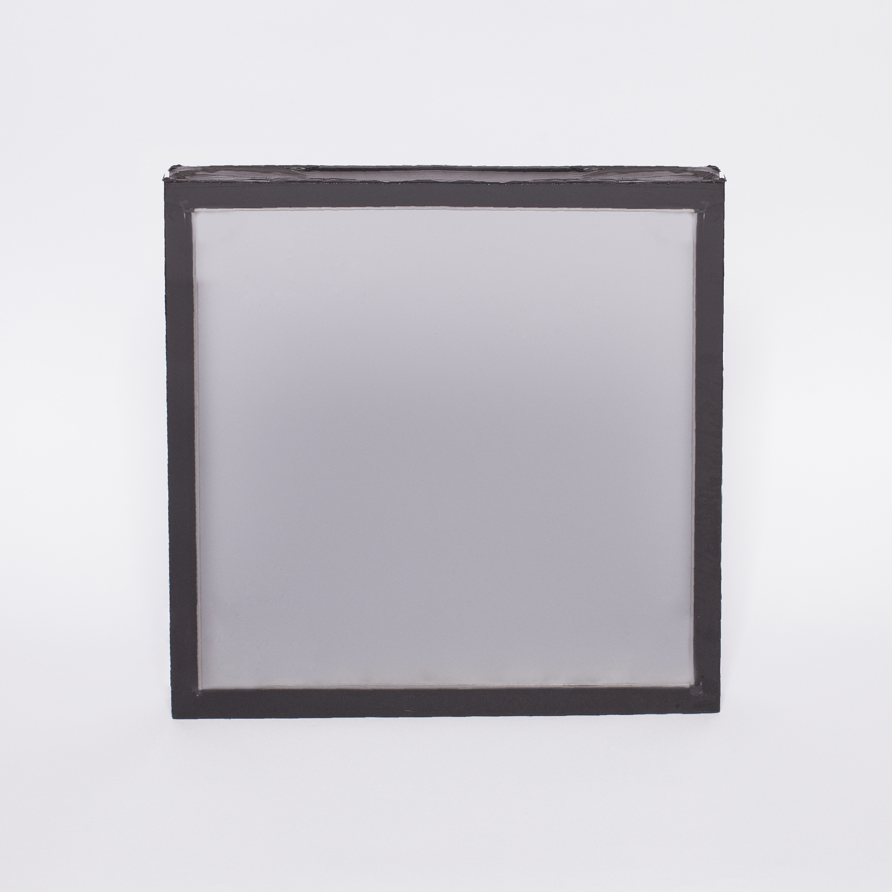 Склопакет "Сірий сатин"